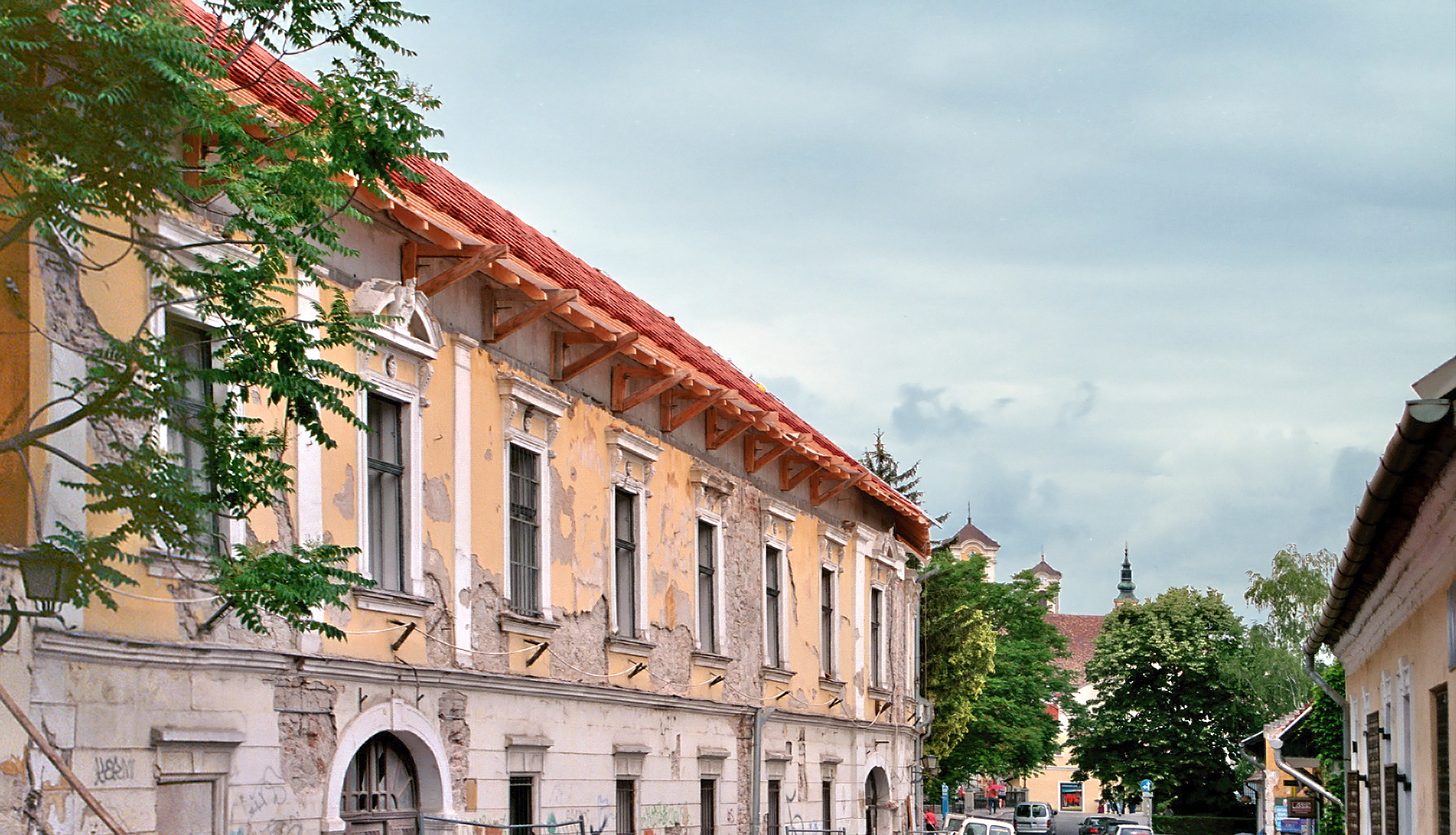 Für den Umzug des Ferenczy-Károly-Museums vom Fő-Platz in Szentendre (Ungarn), wurde ein altes Herrenhaus in der Kossuth-Lajos-Straße 2012 vollständig umgebaut und renoviert.